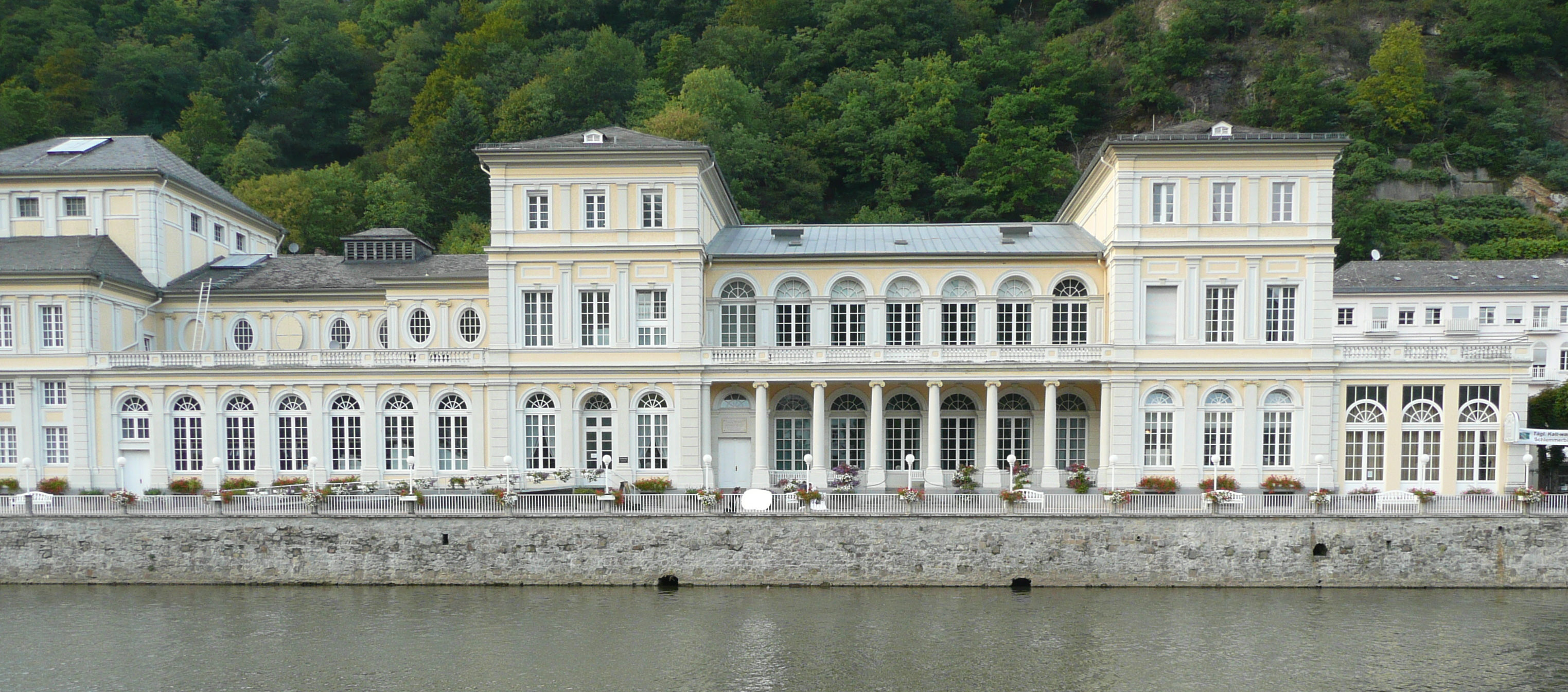 Kursaal Bad Ems